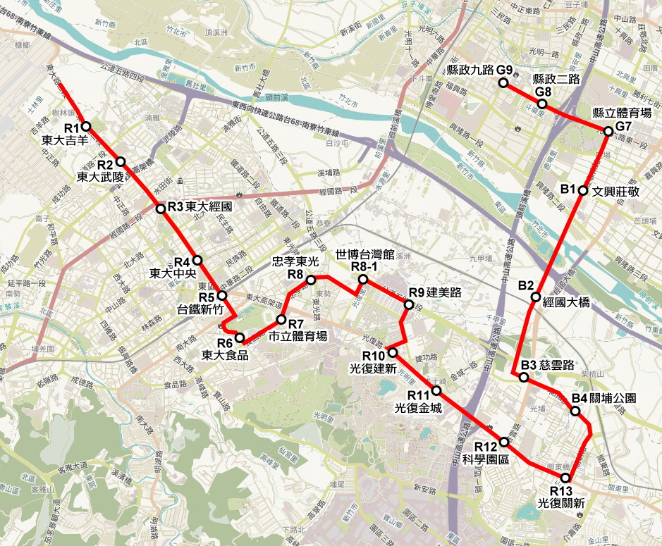 中文（台灣）: 新竹地區輕軌系統建設計畫申請書內的優先路線